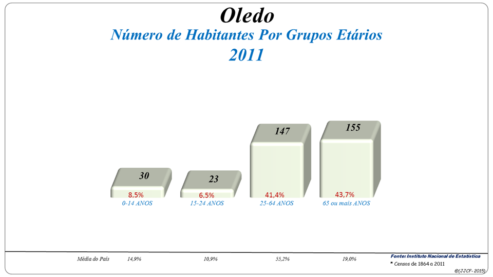 População